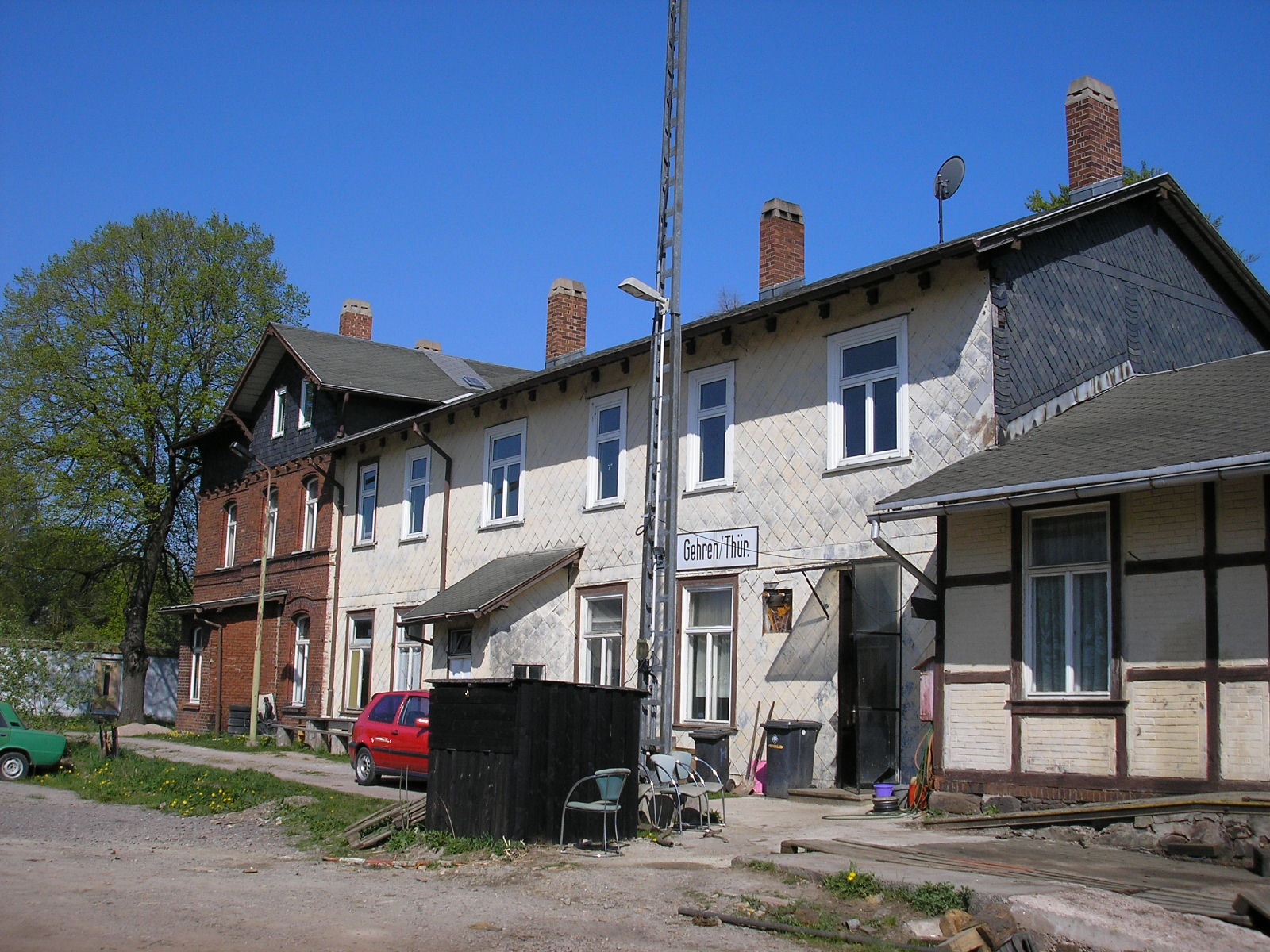 Stillgelegter Bahnhof der Stadt Gehren (Ilm-Kreis, Thüringen).